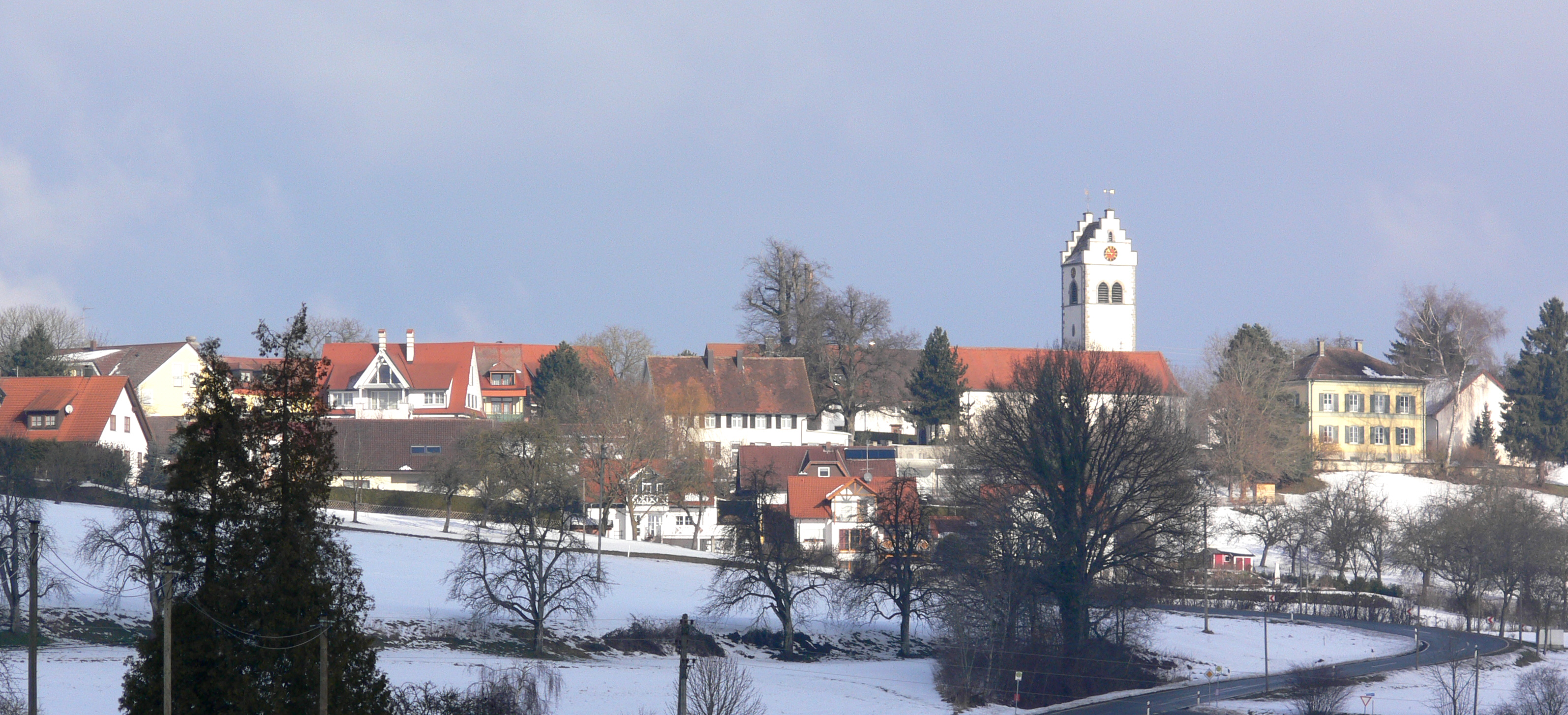 Limpach, Gemeinde Deggenhausertal, Bodenseekreis, mit Pfarrkirche St. Georg